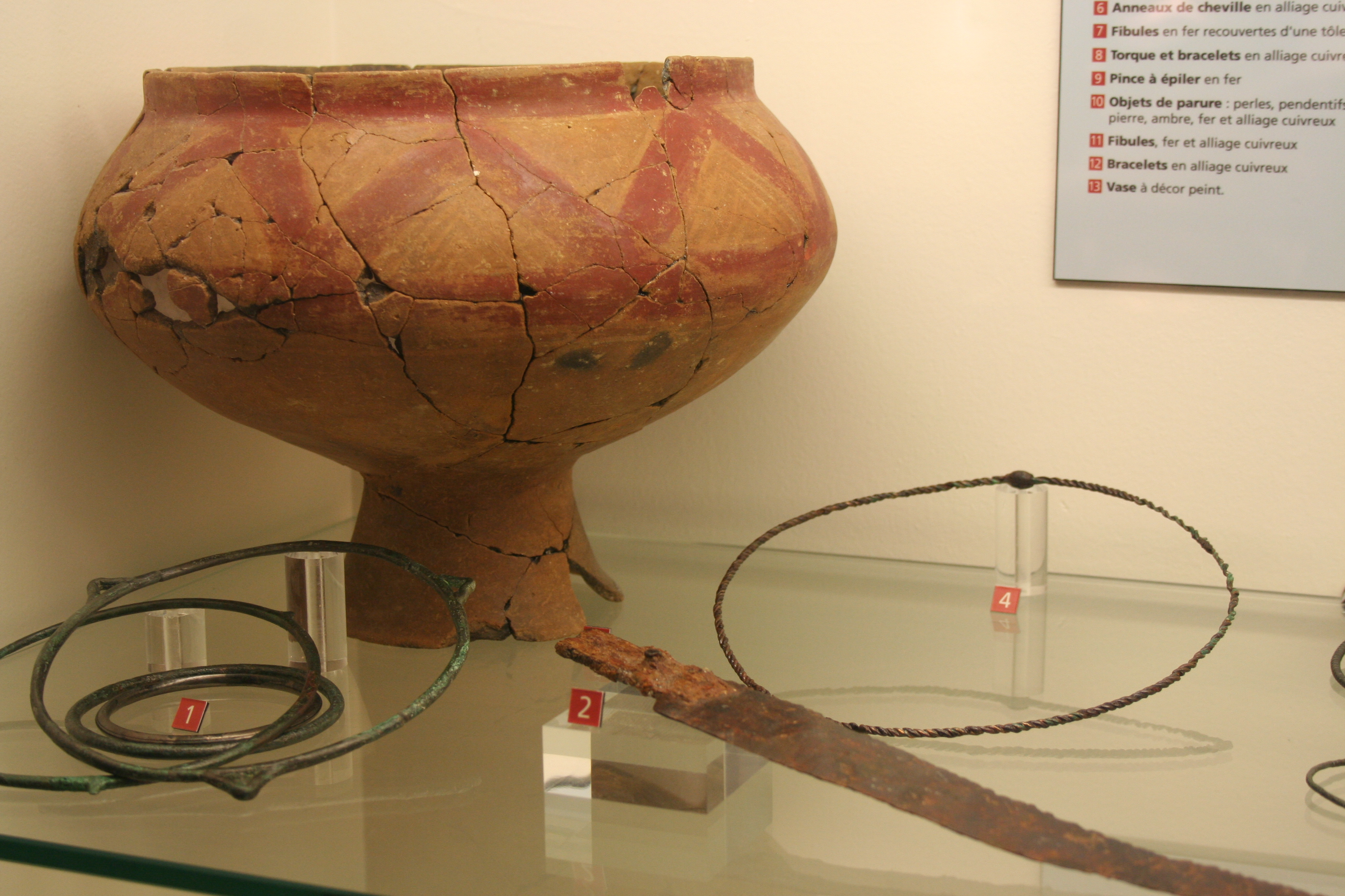 vase d'Eterville